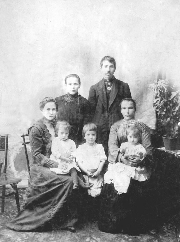 Александр Яковлевич Быков, его супруга Мария Абрамовна (сидит справа) с сестрами